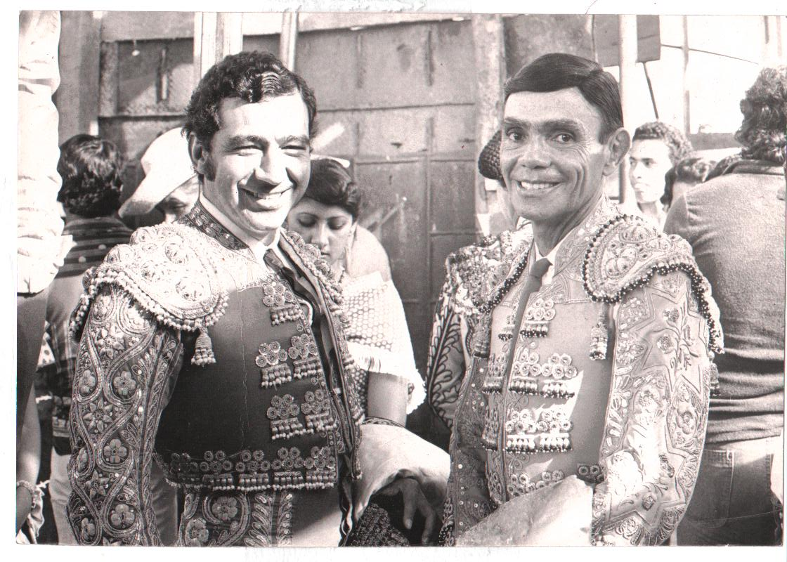 Manolo Martínez y Carmelo Torres